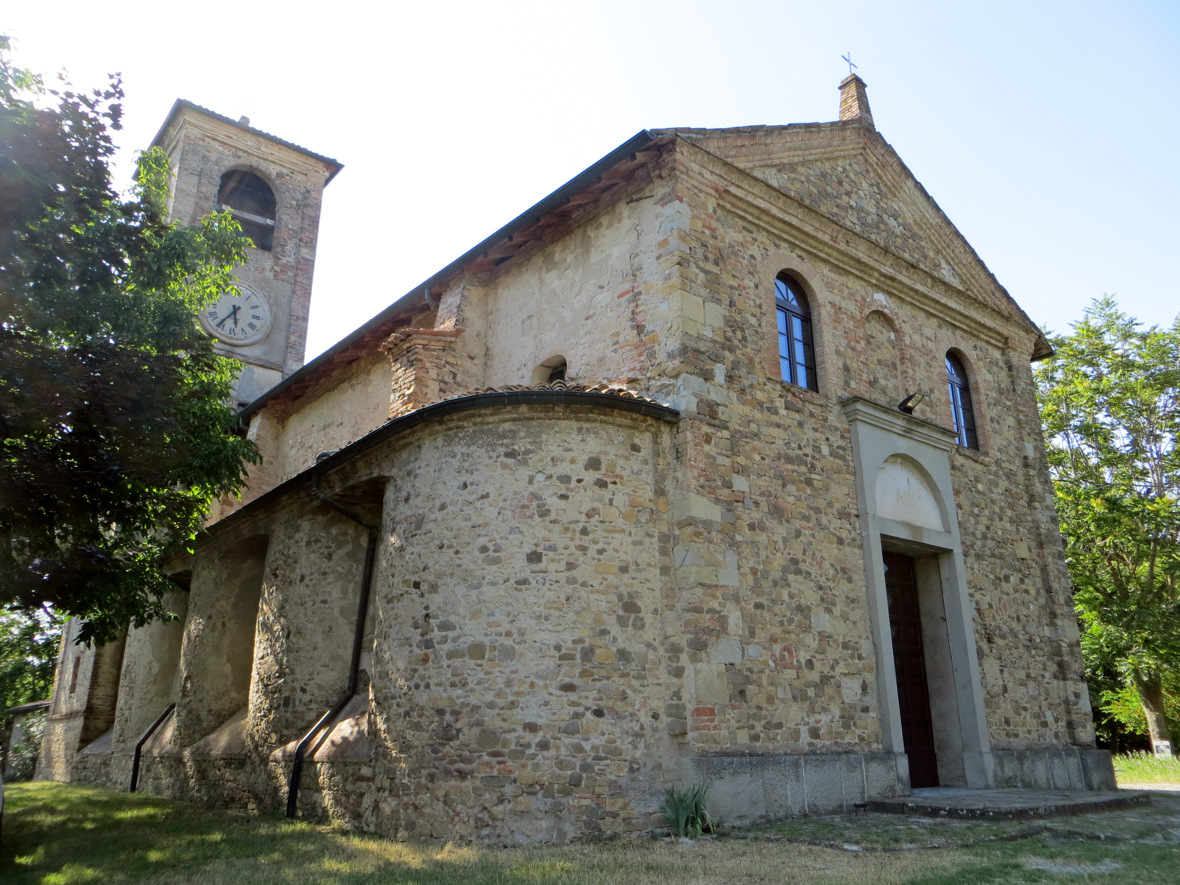 Chiesa di San Martino (Madregolo, Collecchio) - facciata e lato sud